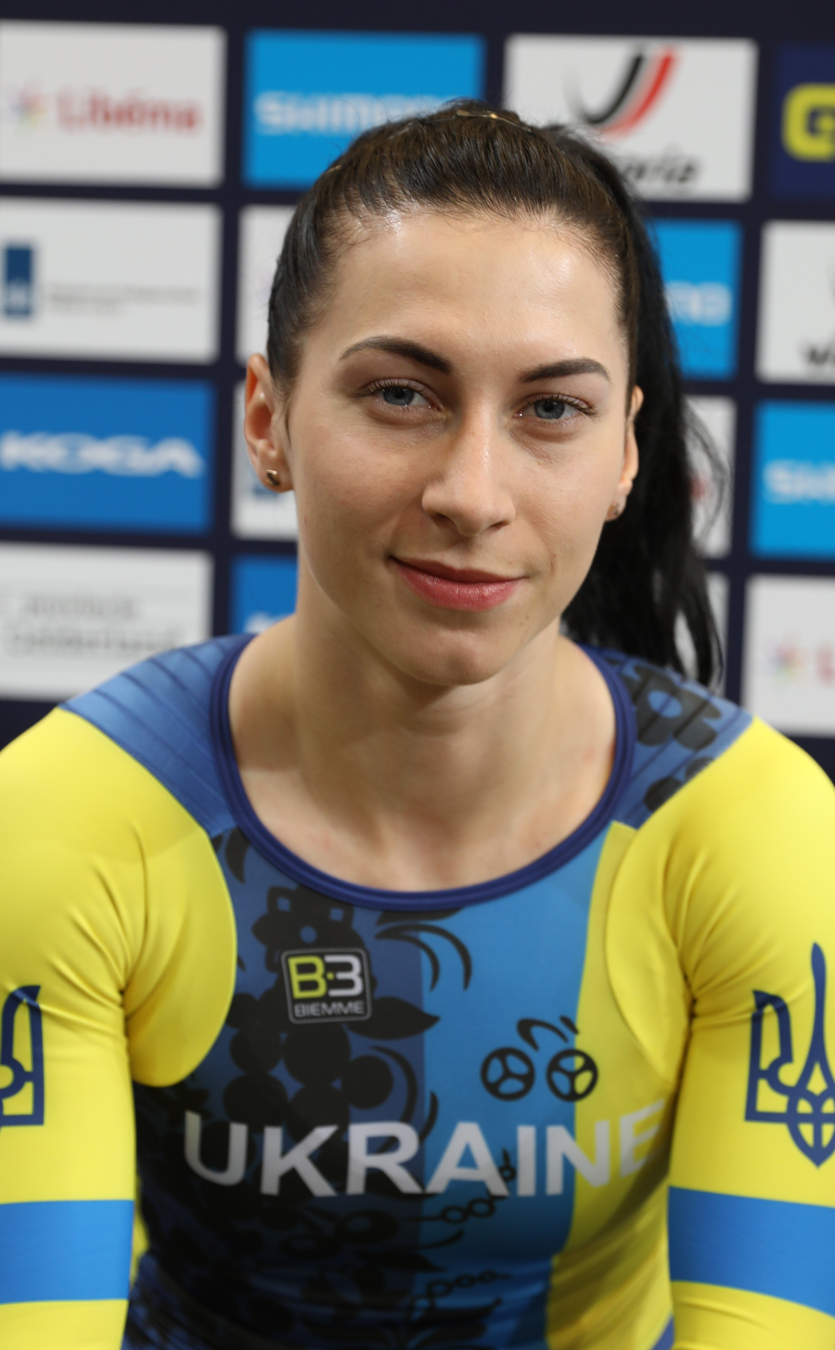 Olena Starikova, ukrainische Radsportlerin